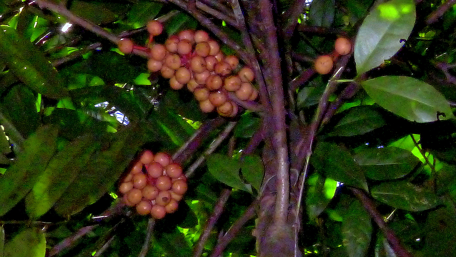 Unonopsis bahiensis Maas & Orava